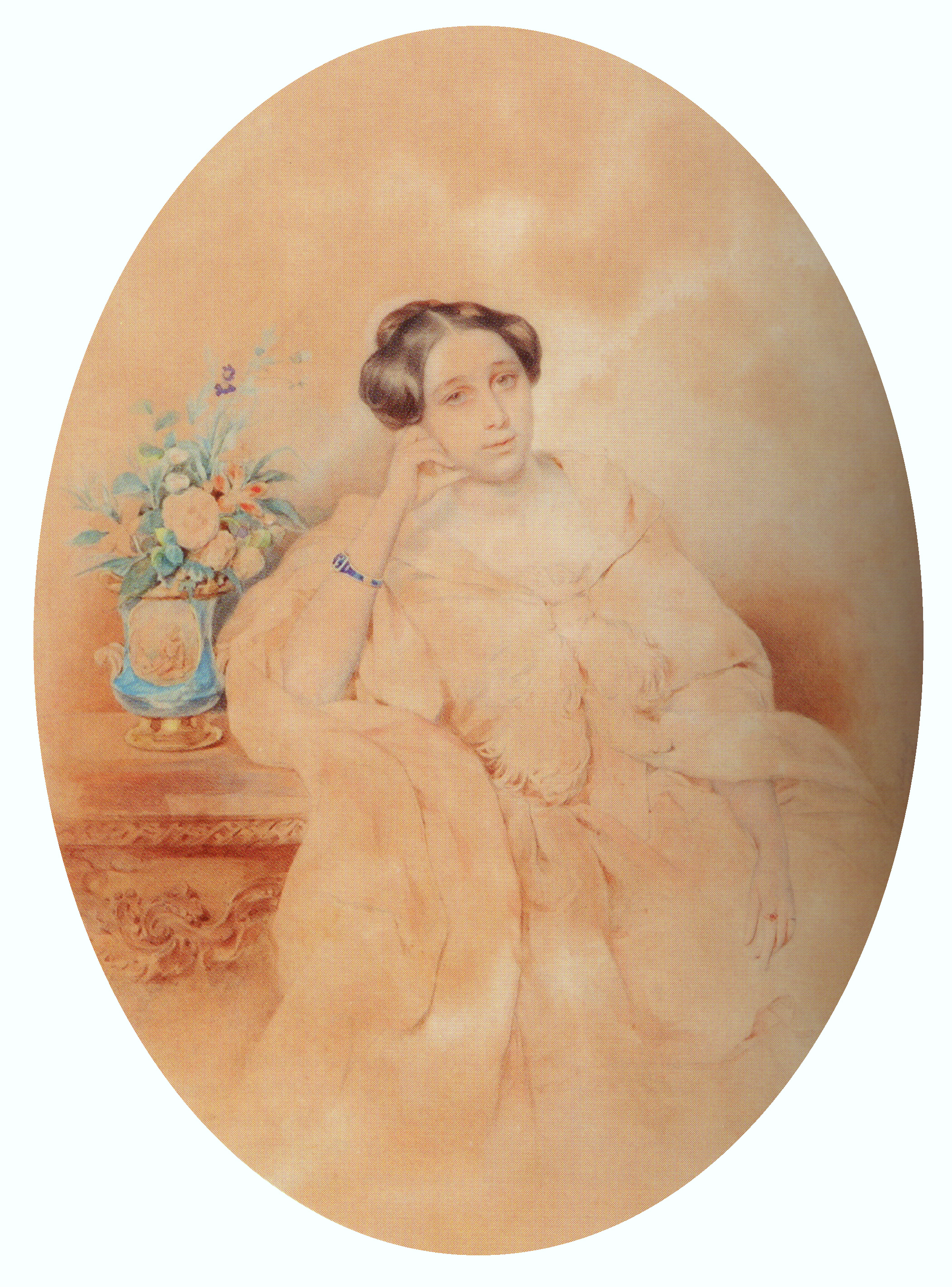 Княгиня Мария Александровна Голицына, ур. Львова (1826—1901).